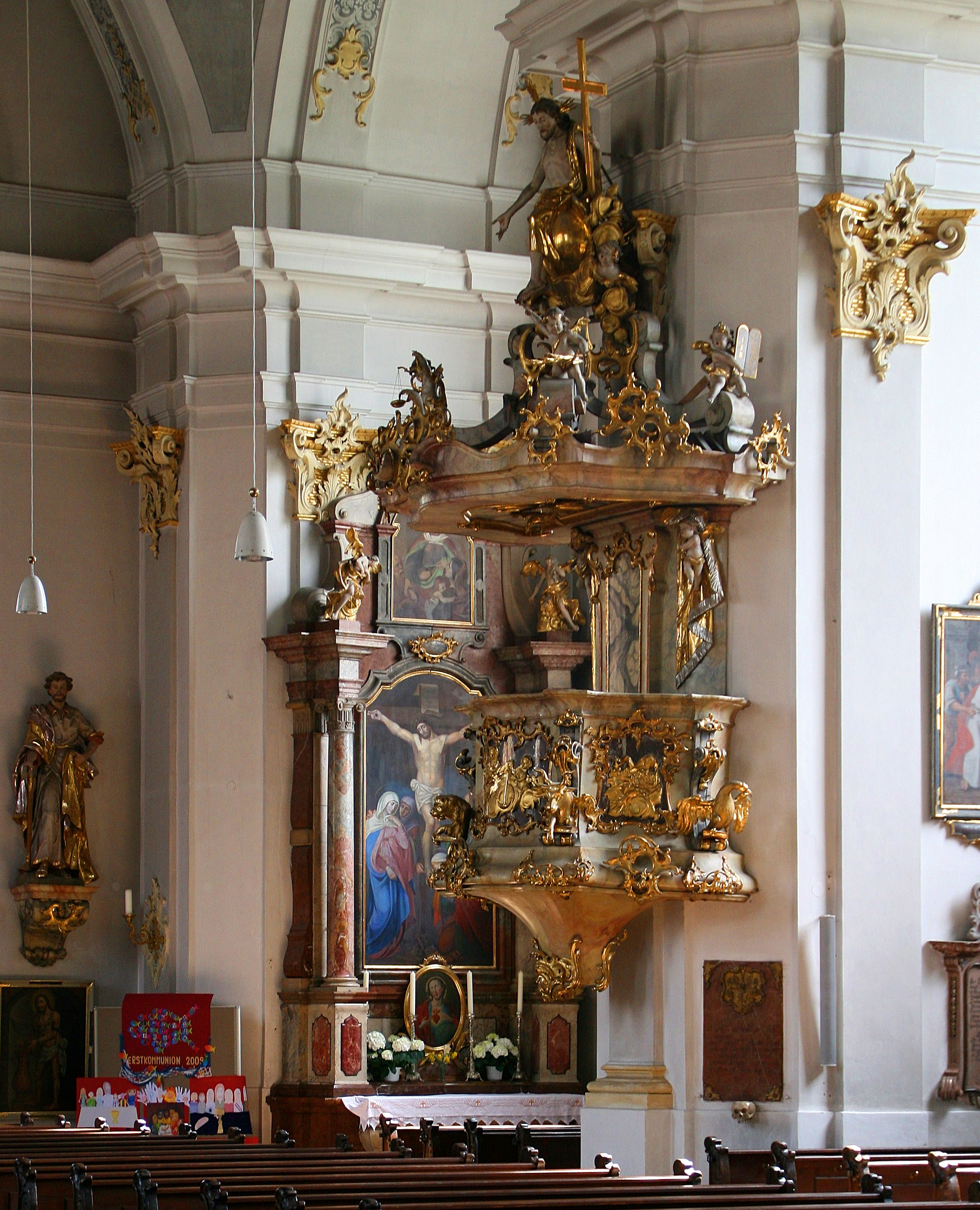 Die Rokoko-Kanzel von St. Nikolaus, kath. Stadtpfarrkirche von Mühldorf am Inn, Landkreis Mühldorf am Inn, Oberbayern. Das bewegte, detailüppige Kunstwerk wurde 1772 geschaffen.